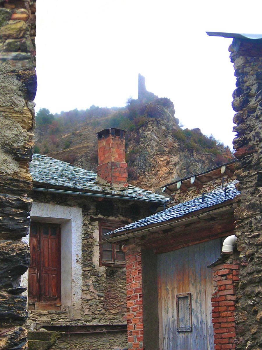 Restes del Castell d'Ars, conegut com la Seca, al municipi de les Valls de Valira (Alt Urgell)